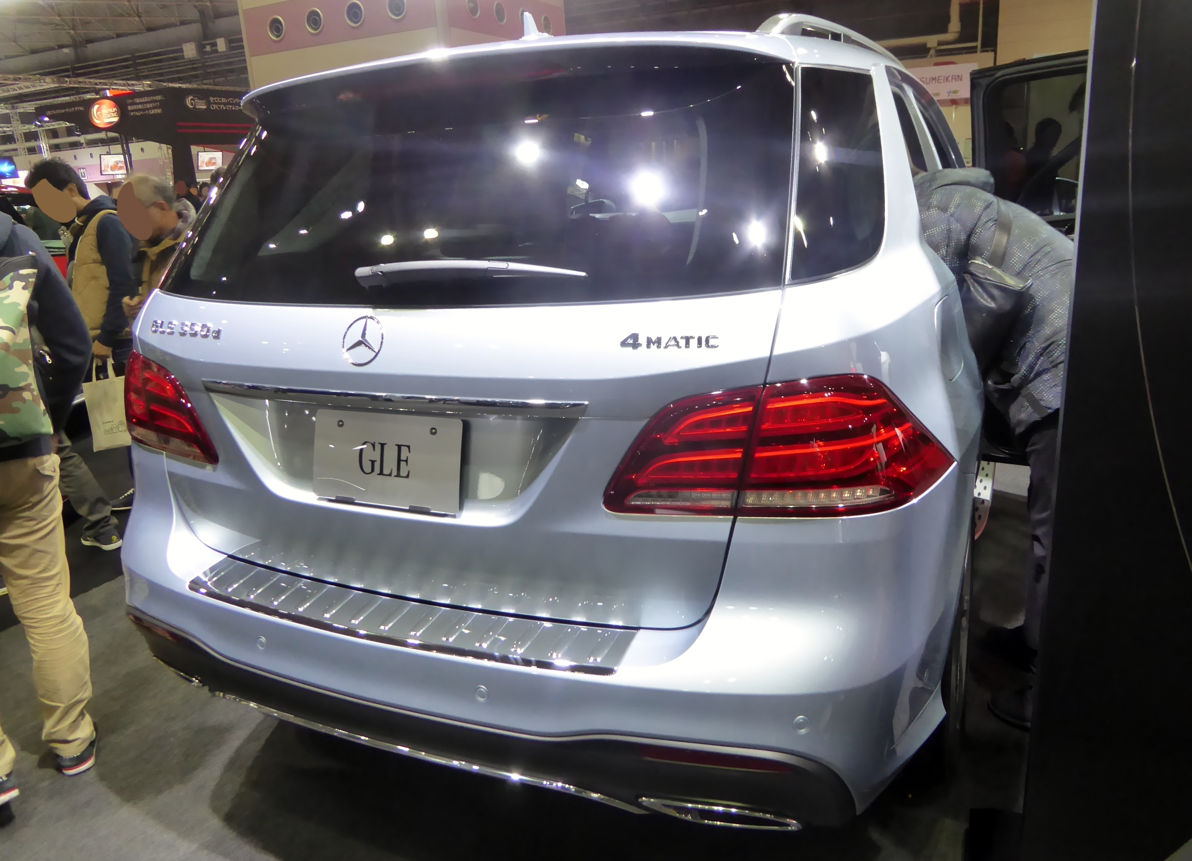 大阪モーターショー2015においてW166型メルセデス・ベンツ・GLE350d 4マティックスポーツを撮影。